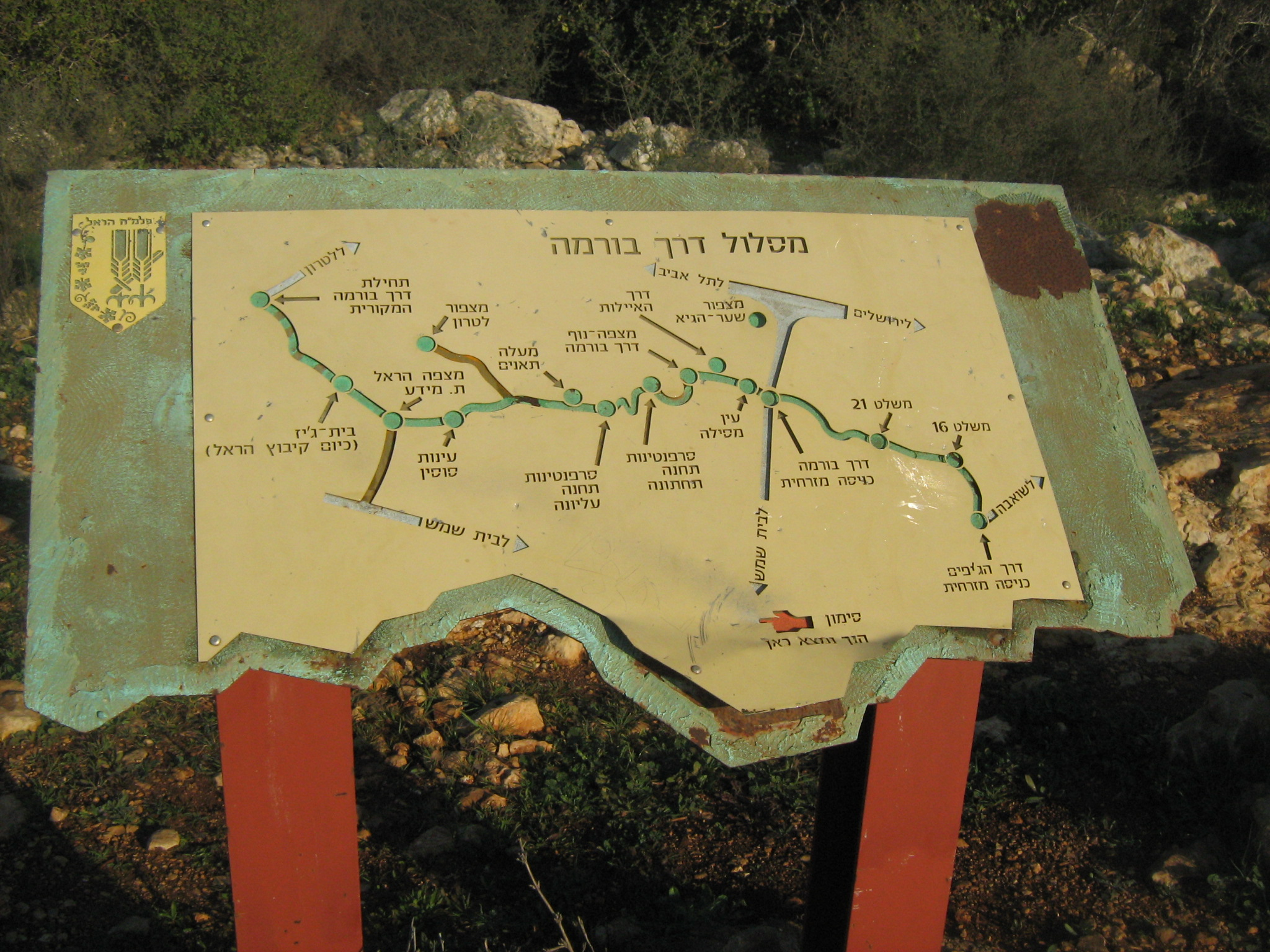 מישלט 21 - דרך בורמה